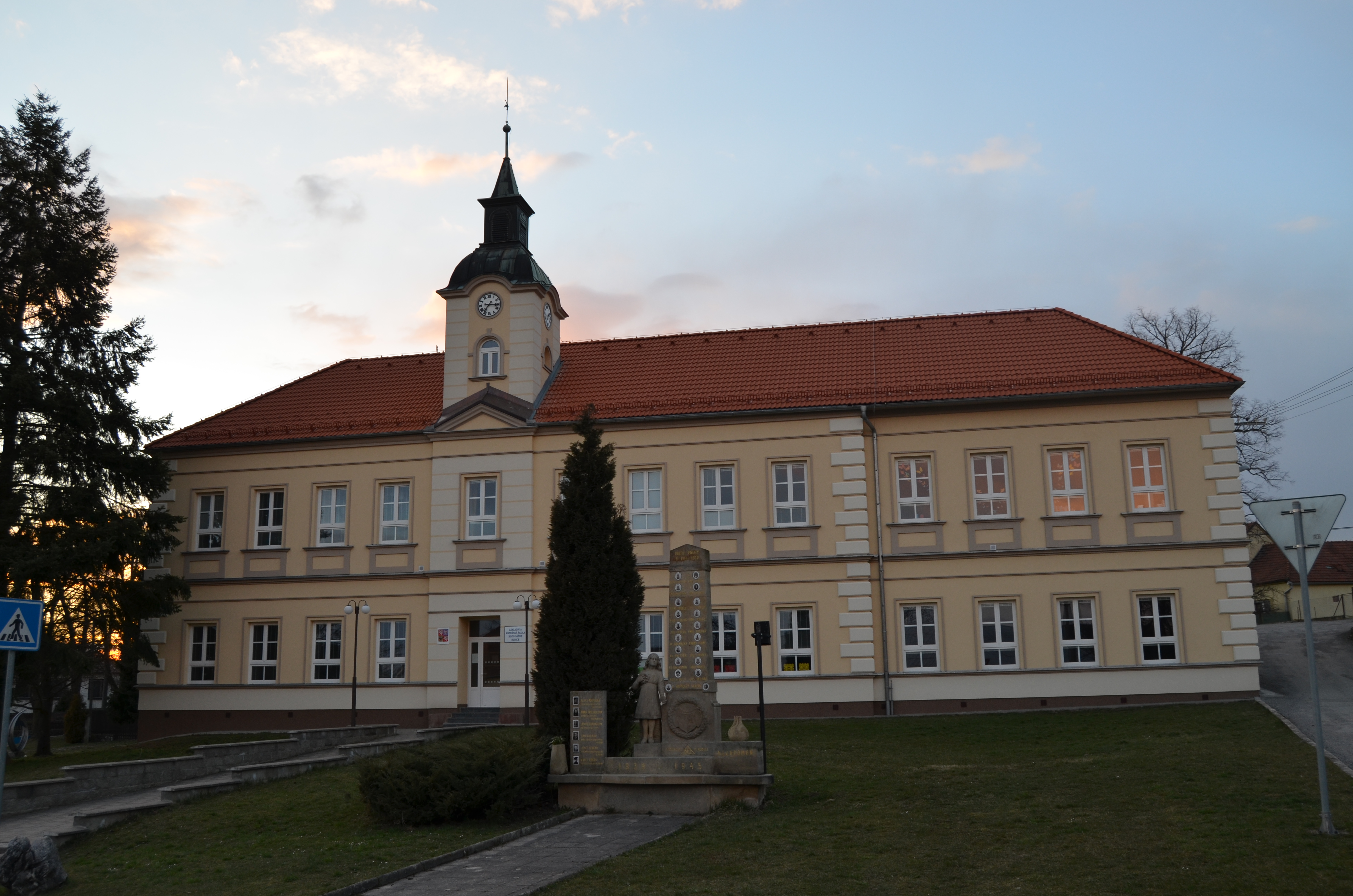 Základní škola a Mateřská škola Hugo Sáňky Rudice